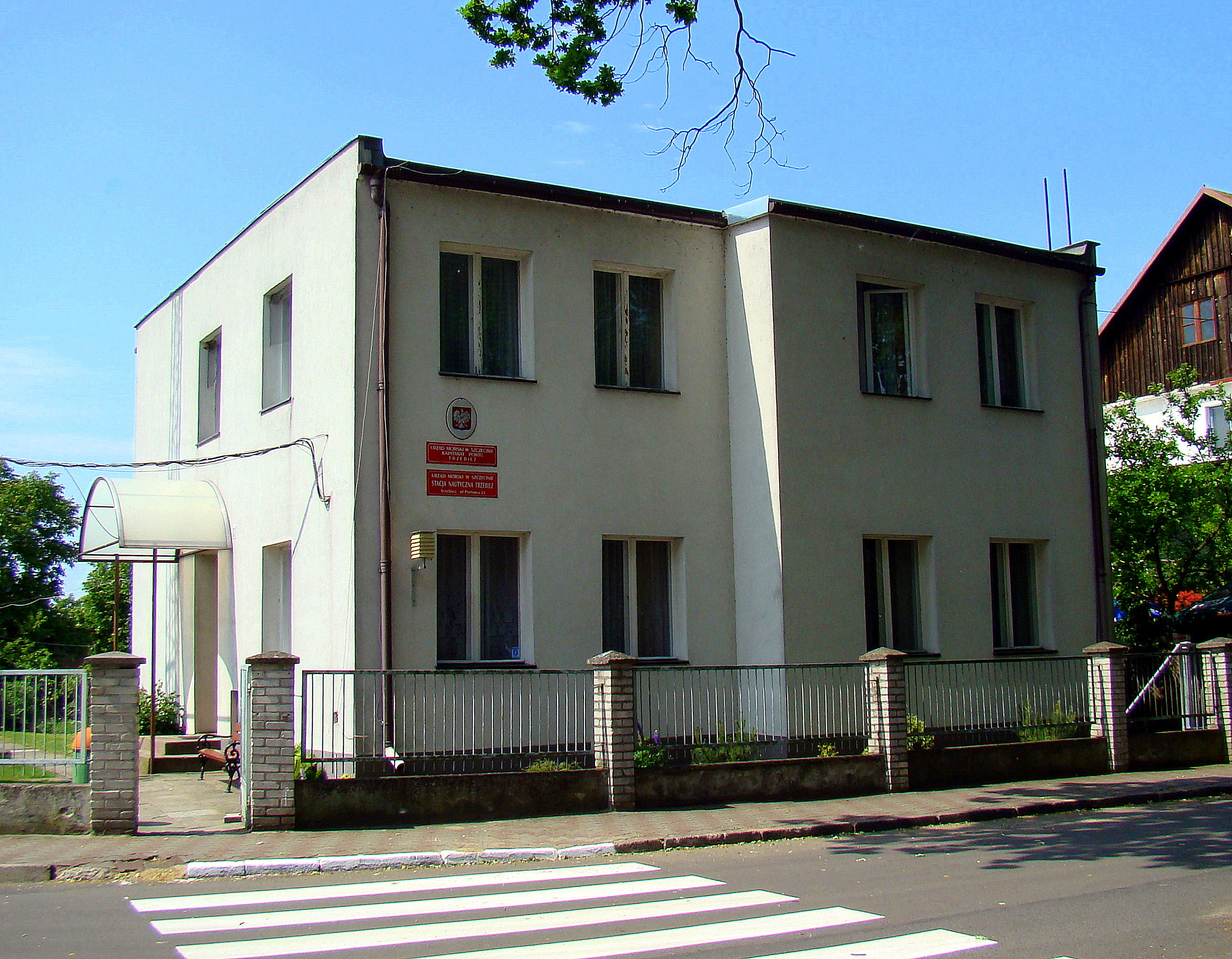 Kapitanat Portu Trzebież, Województwo zachodniopomorskie, Polska